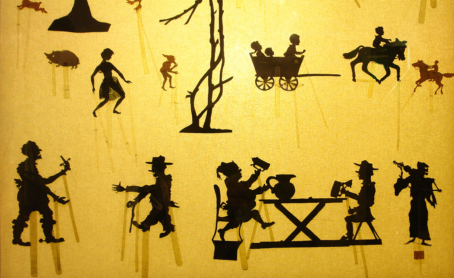 Lübecker Theaterfigurenmuseum